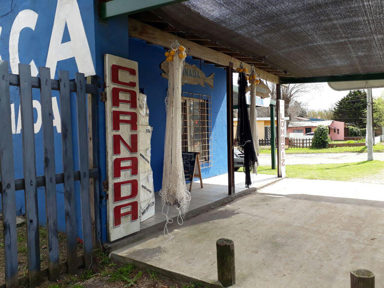 Un trasmallo en exposición en un comercio en San Clemente del Tuyú en 2017